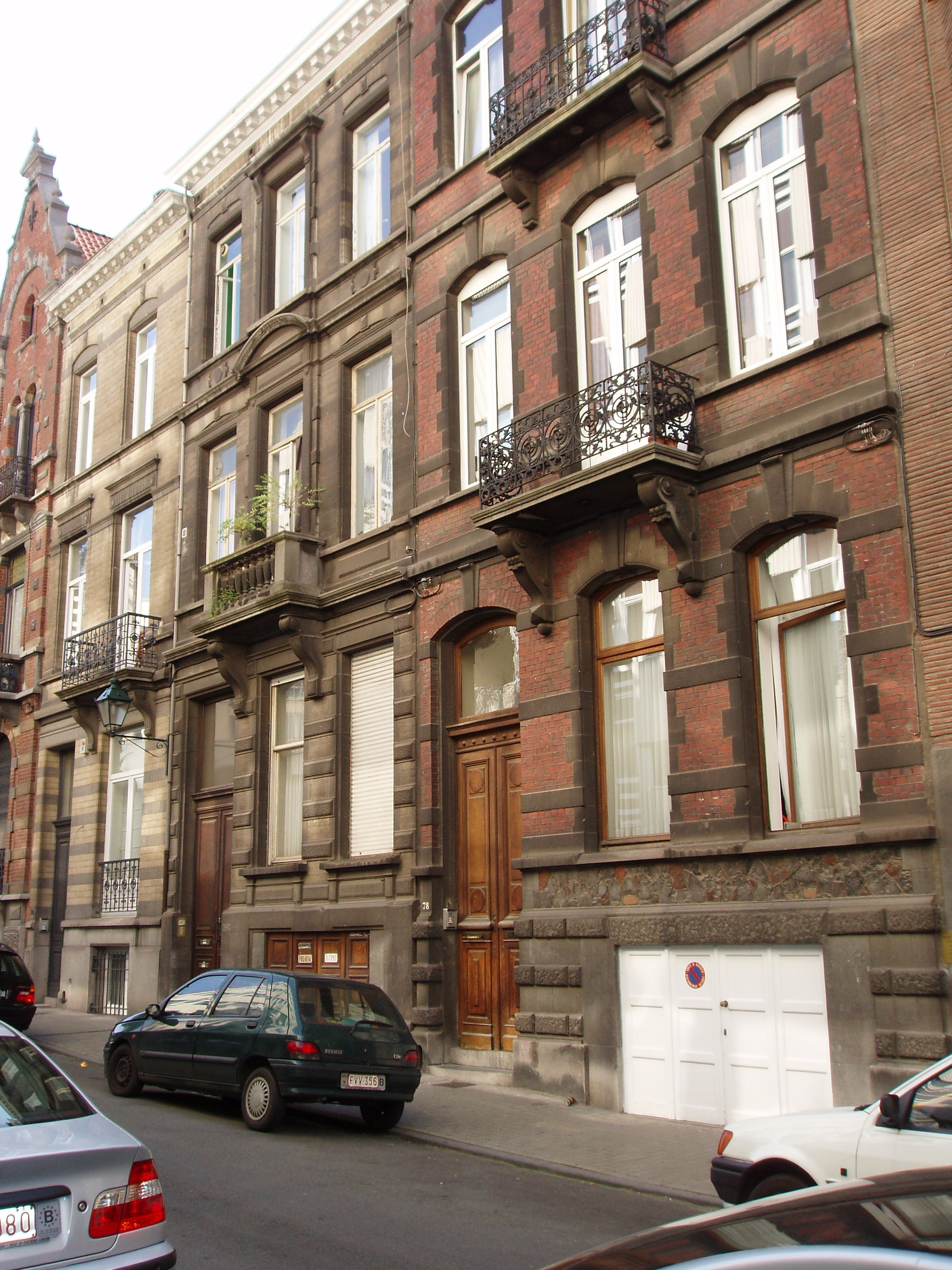 rue de la source, Saint-Gilles/Sint-Gillis